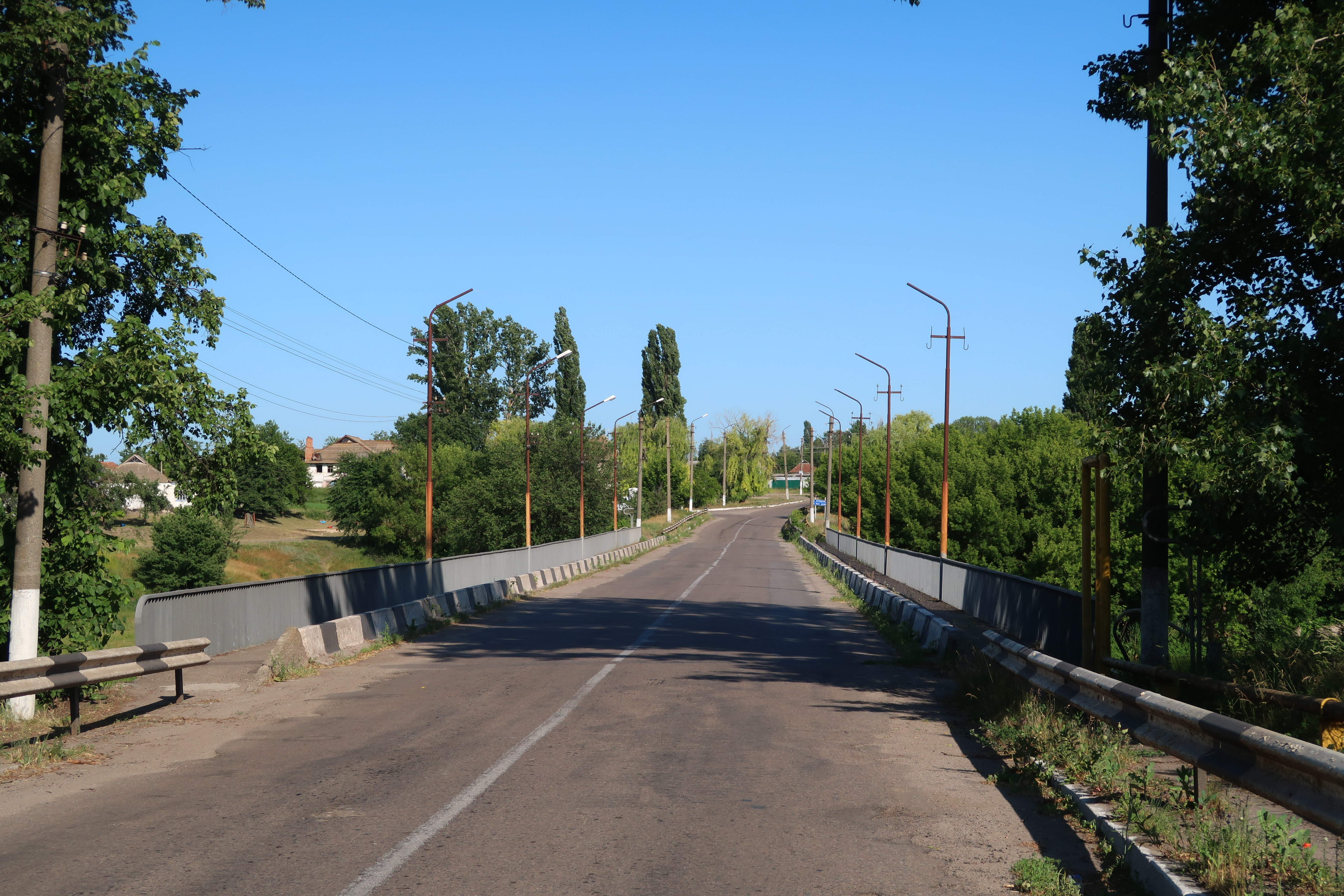 Автомобільний міст через річку Рось у с. Яблунівка